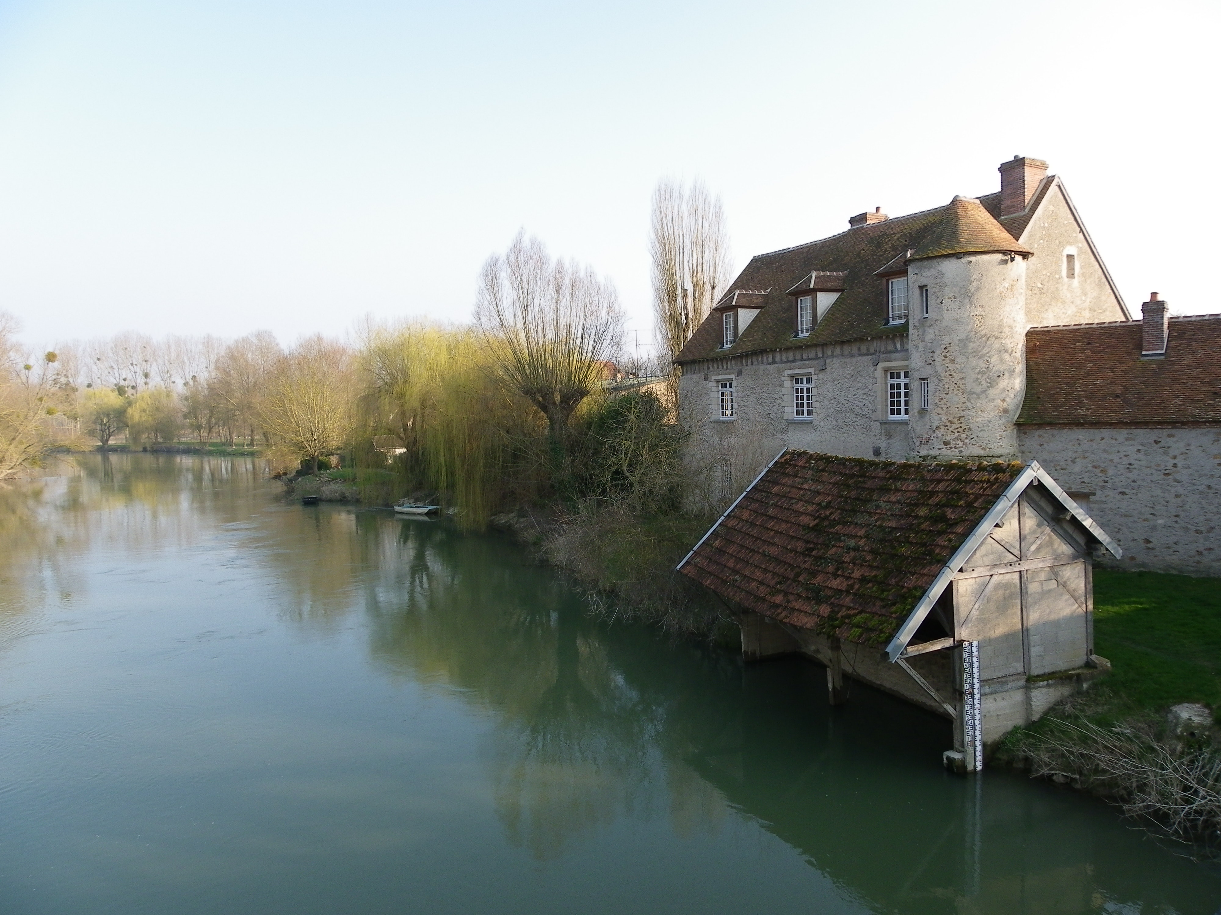 derriére le lavoir: camac de Marnay sur Seine